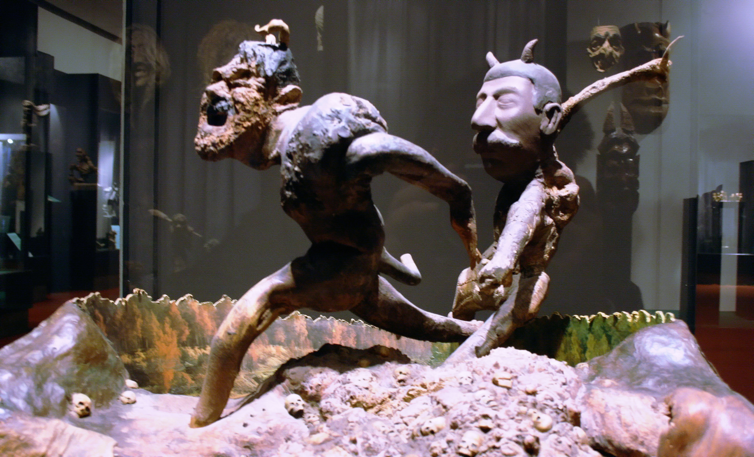 Žmuidzinavičius-Museum in Kaunas. Stalin und Hitler führen einen Totentanz auf.